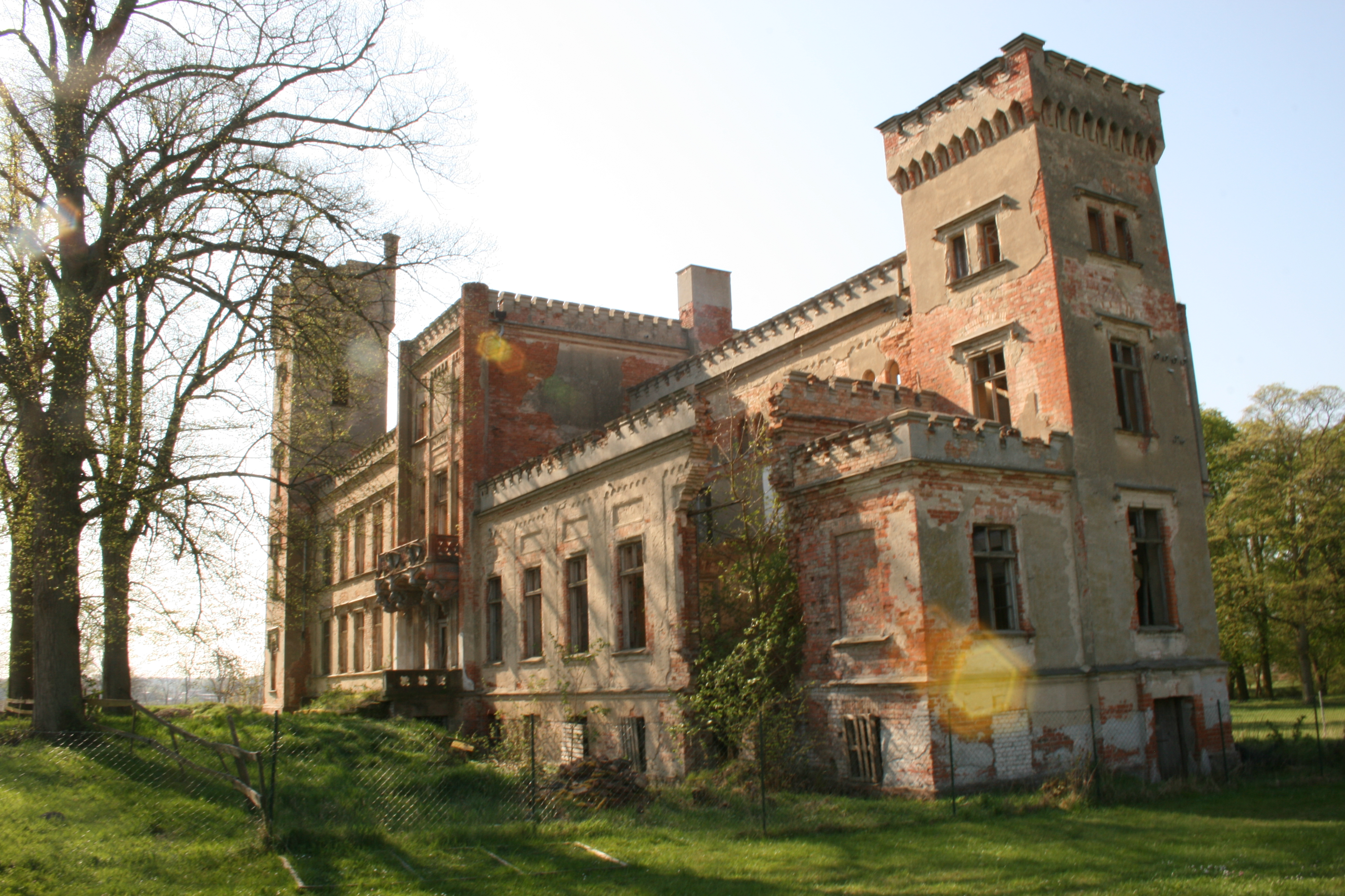 Schlossruine Hohenlandin Brandenburg Deutschland